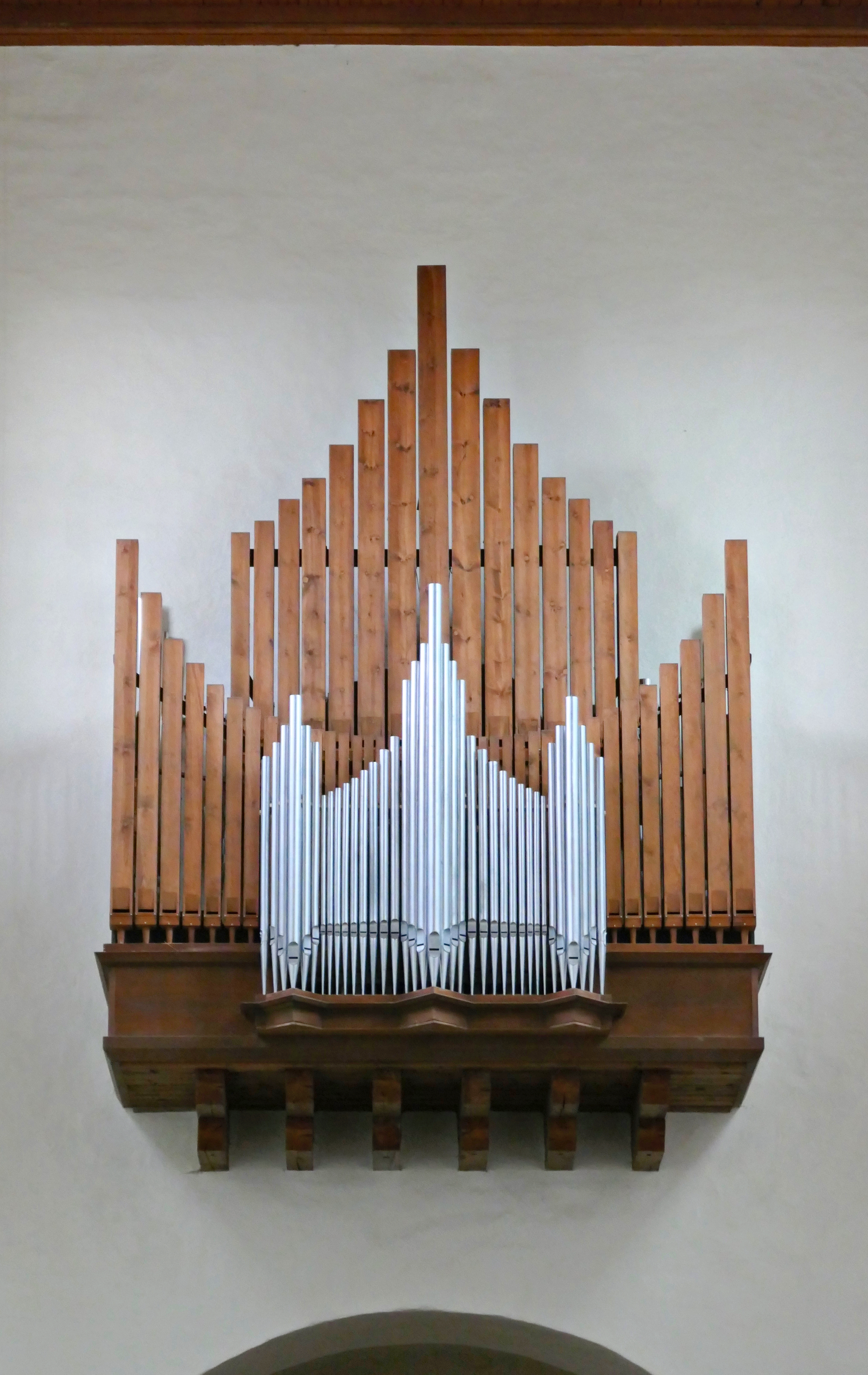 Liebfrauenkirche Halberstadt, Landkreis Harz, Sachsen-Anhalt, Deutschland